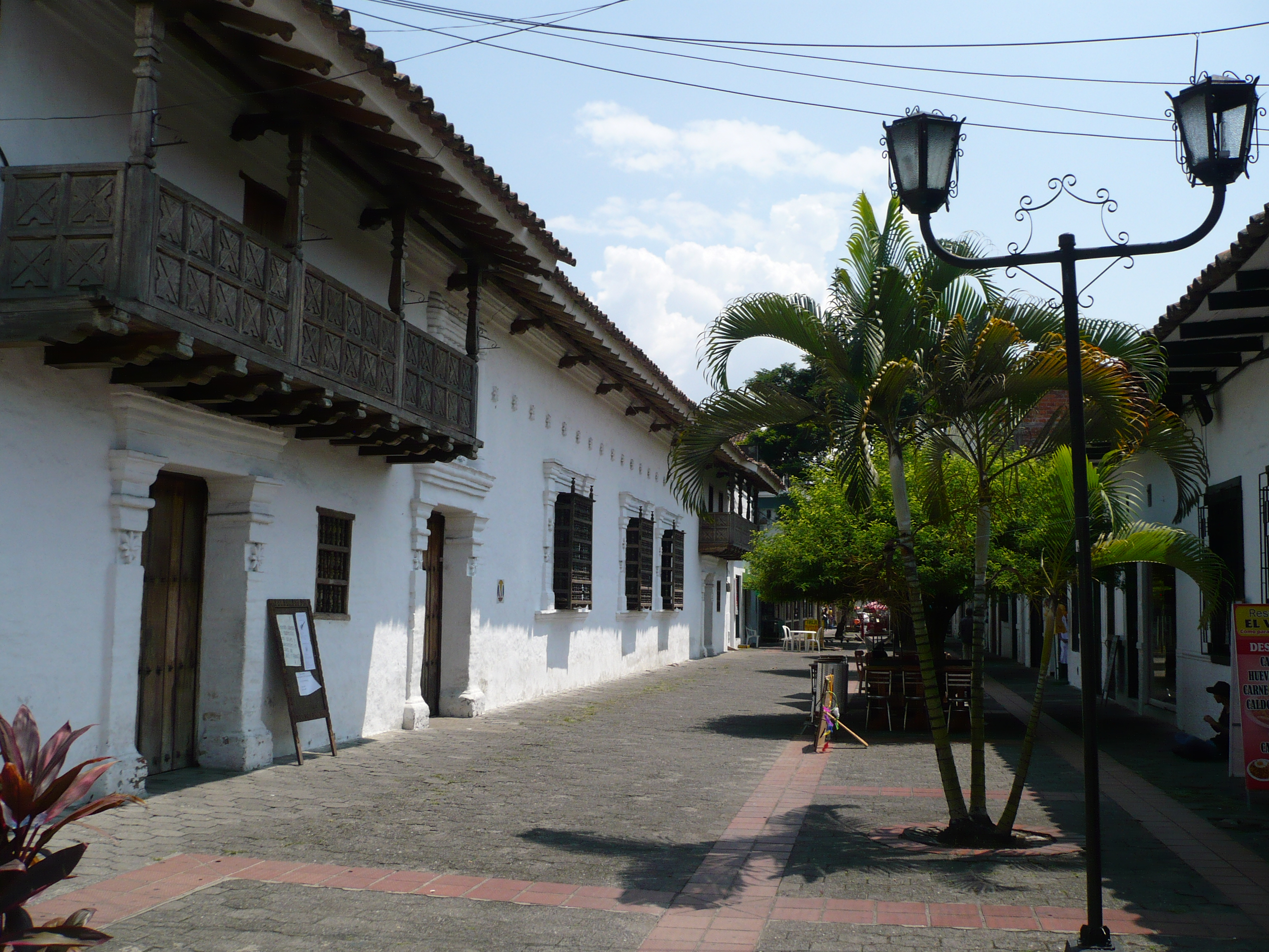 Casa del Virrey. Cartago, Valle, Colombia.